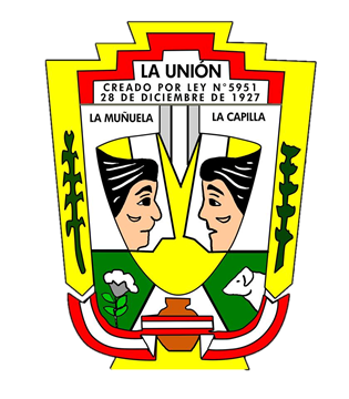 Escudo La Unión